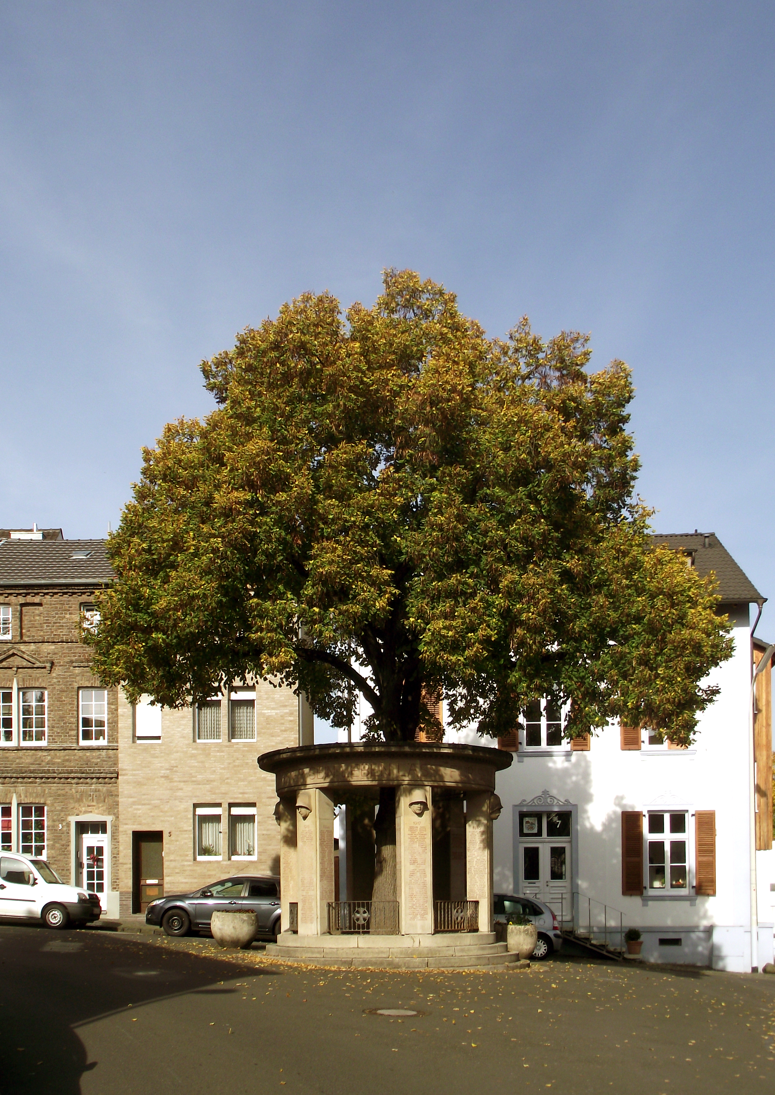 Kriegerdenkmal (Kriegerehrenmal) in Kessenich 2012